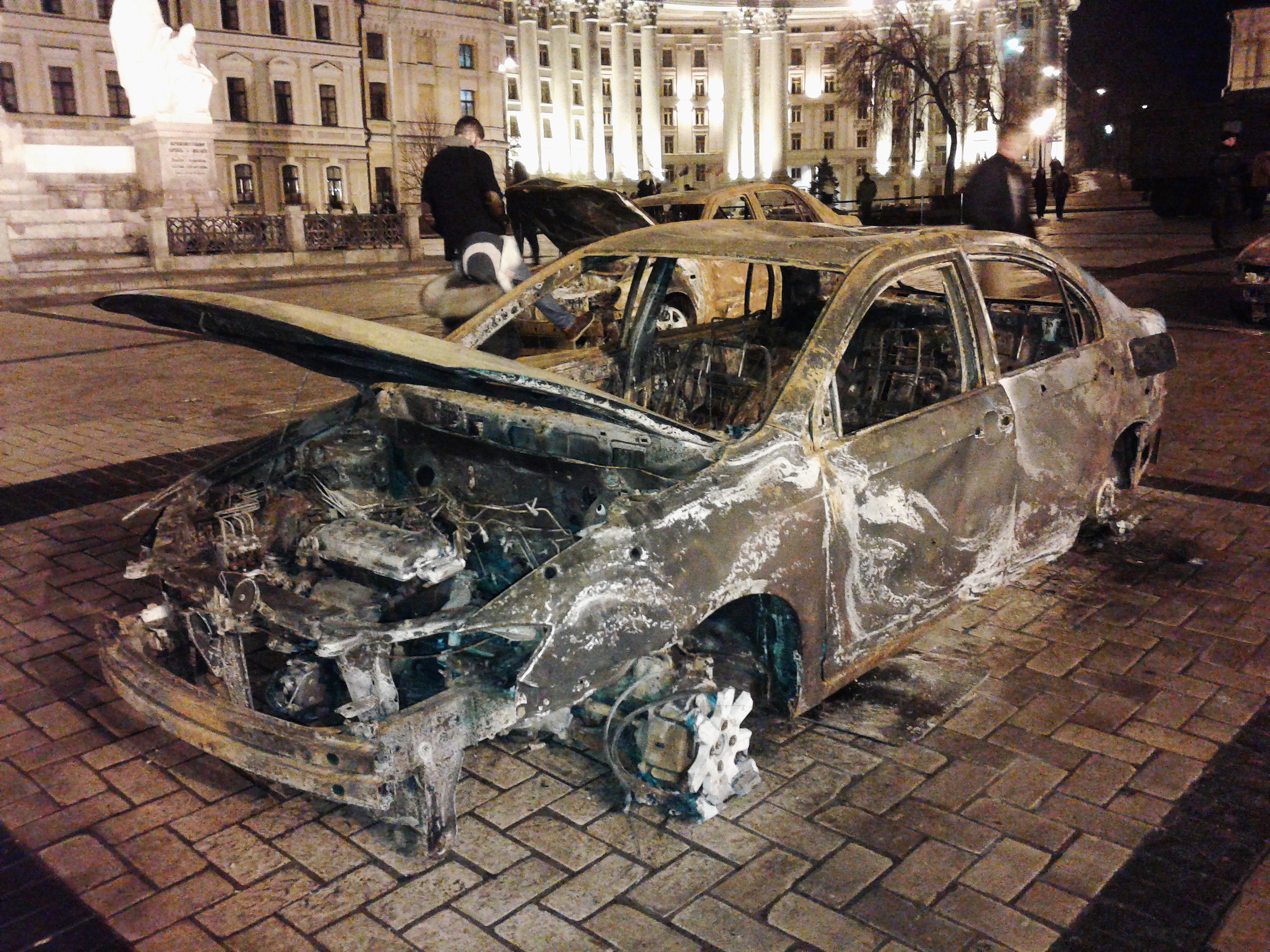 Пошкоджений реактивними снарядами автомобіль із Маріуполя. 24 січня 2015 р. Маріуполь обстріляли члени незаконних збройних формувань із РСЗО БМ-21 «Град» з боку селищ Заїченко Волноваського району та Жовтень Новоазовського району Донецької області, які на той час перебували під контролем російсько-терористичних військ. Виставка «Докази агресії російських військ на території України», Київ, лютий 2015 р.